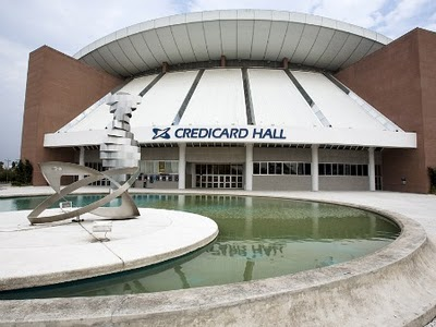 jhonatn